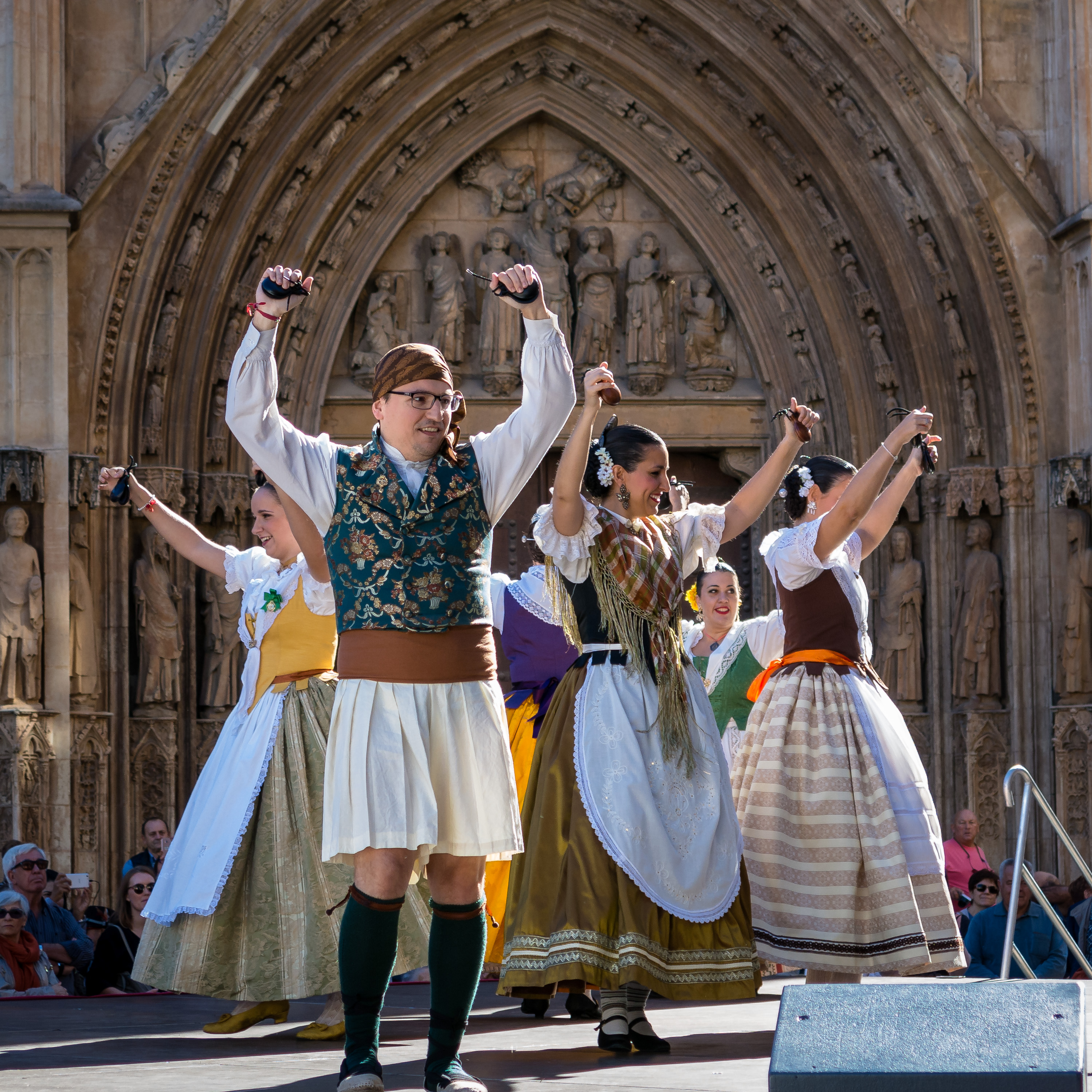 La Junta Central Fallera organiza el festival Balls al Carrer ("Bailes en la Calle") para promocionar los bailes típicos. Las comisiones falleras participantes actúan los domingos de Octubre a Febrero frente a la Catedral. This is a photography of a Folklore festival in Spain (Wikidata id Q1143768).